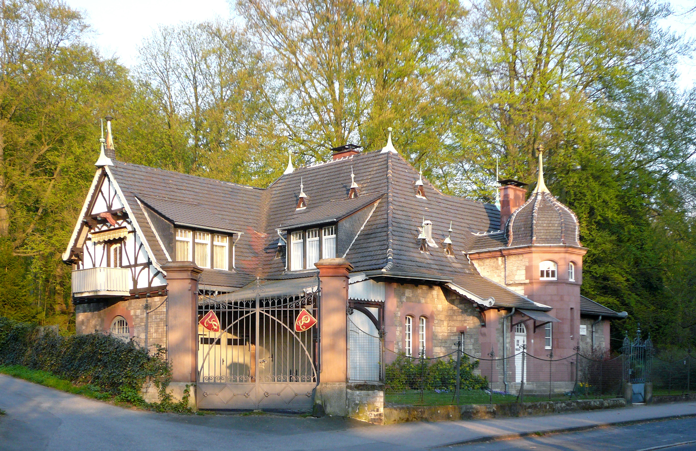 Ehemalige Remise und Kutscherhaus der Villa Levin in Göttingen, Merkelstraße 7. Erbaut 1899/1900, Architekten: Grisebach & Dinklage